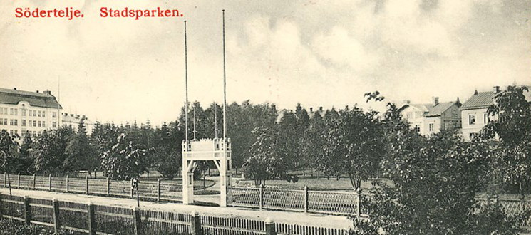 Stadsparken i Södertälje från järnvägsstationen några år efter sekelskiftet 1900